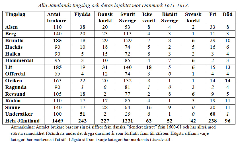 Tabell över räfsten i Jämtland 1613